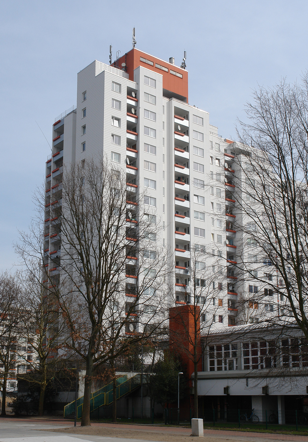 Bremen-Osterholz: Hochhaus in Tenever, Ludwigshafener Str. 12/14)